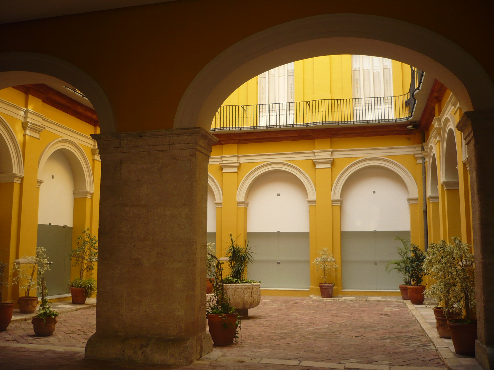 Palacio del Marqués de campo, frente al Palacio Arzobispal en Valencia. Patio Interior.